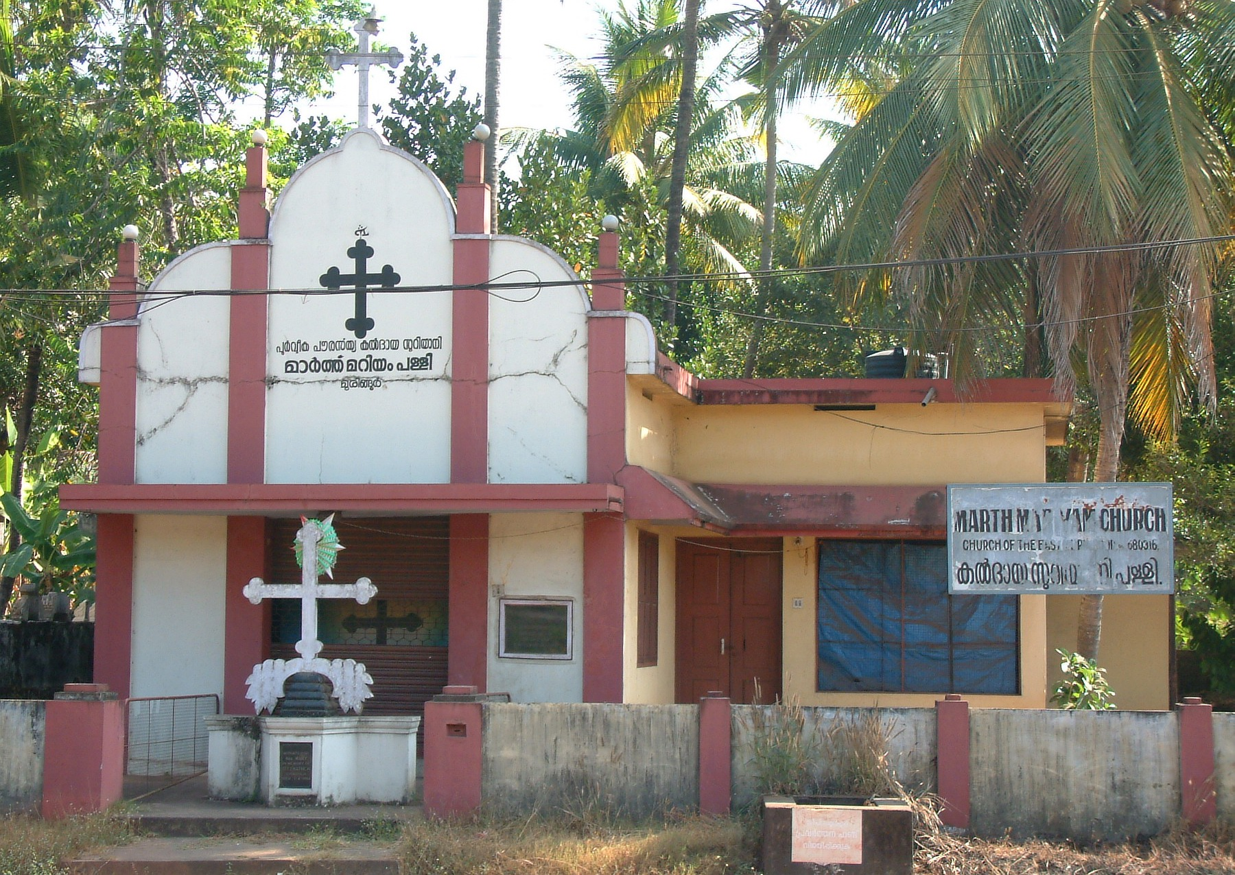 An eastern syrian church in chalakudy